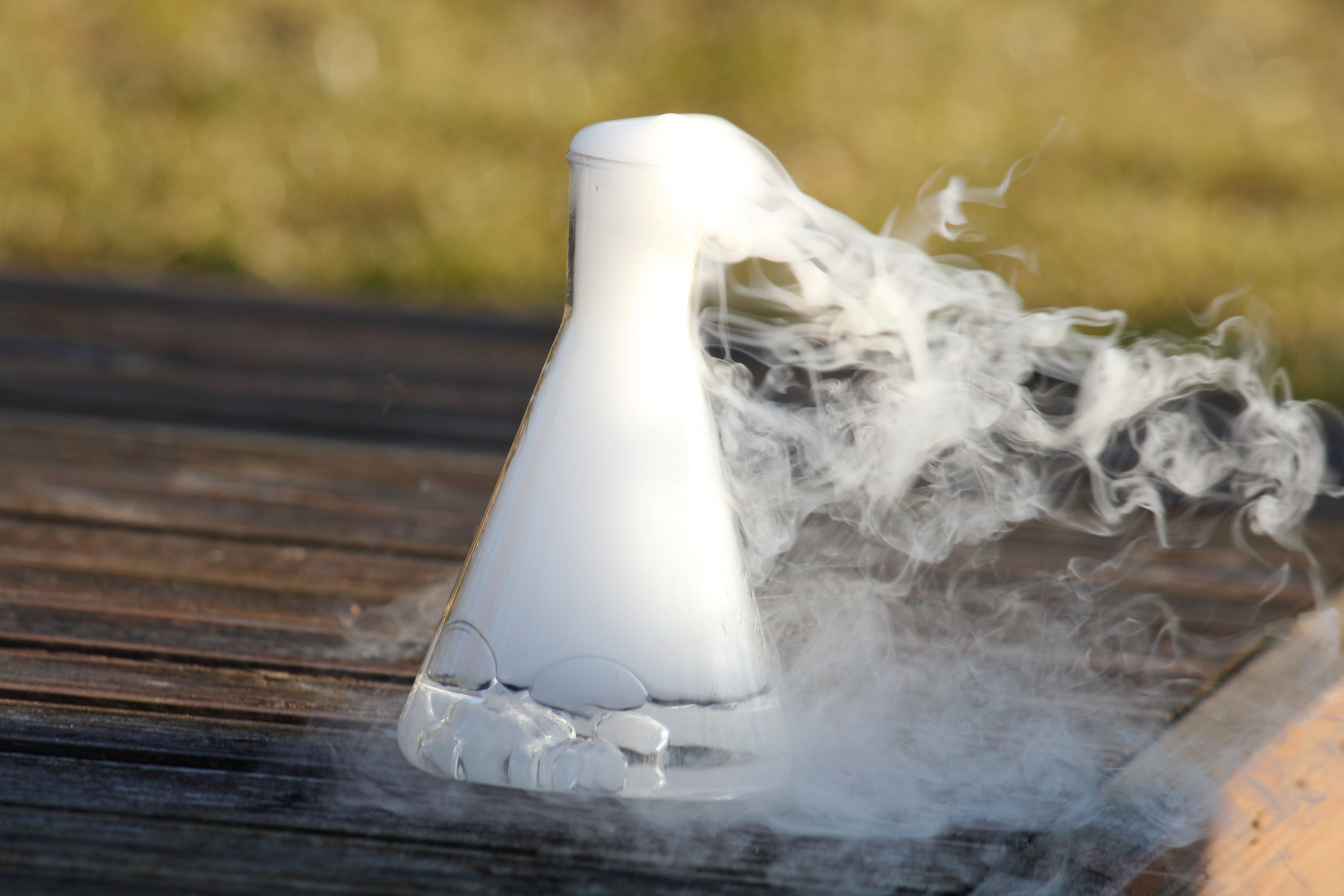 Kuivjää on kokkusurutud süsihappegaas (CO2), mis soojenemisel muutub tagasi gaasiliseks süsihappegaasiks. Vette pannes toimub kiire gaasi eraldumine, mida on võimalik näha piltidelt.